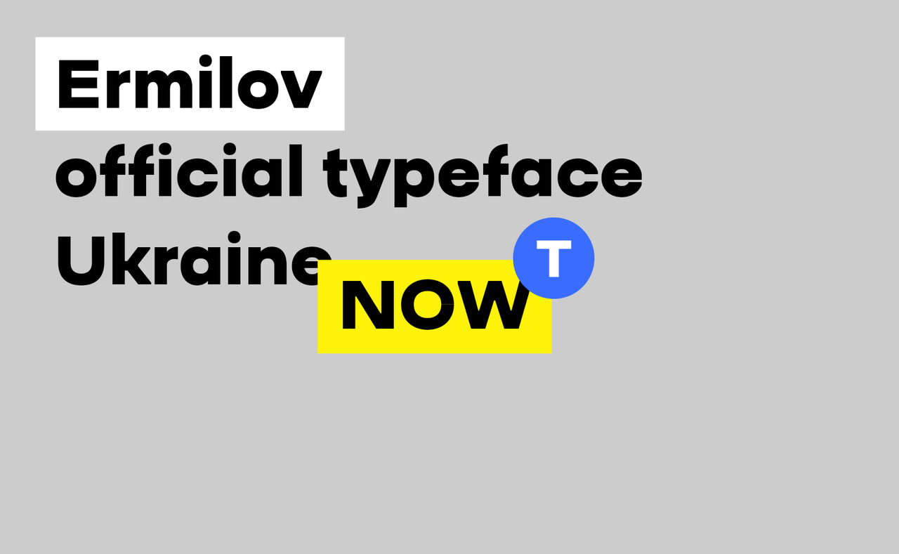 Приклад використання бренду Ukraine NOW. У вільному доступі